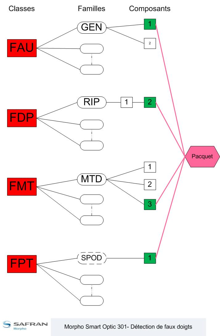 Certification Detection faux doigt : paquet d'exigences fonctionnellles